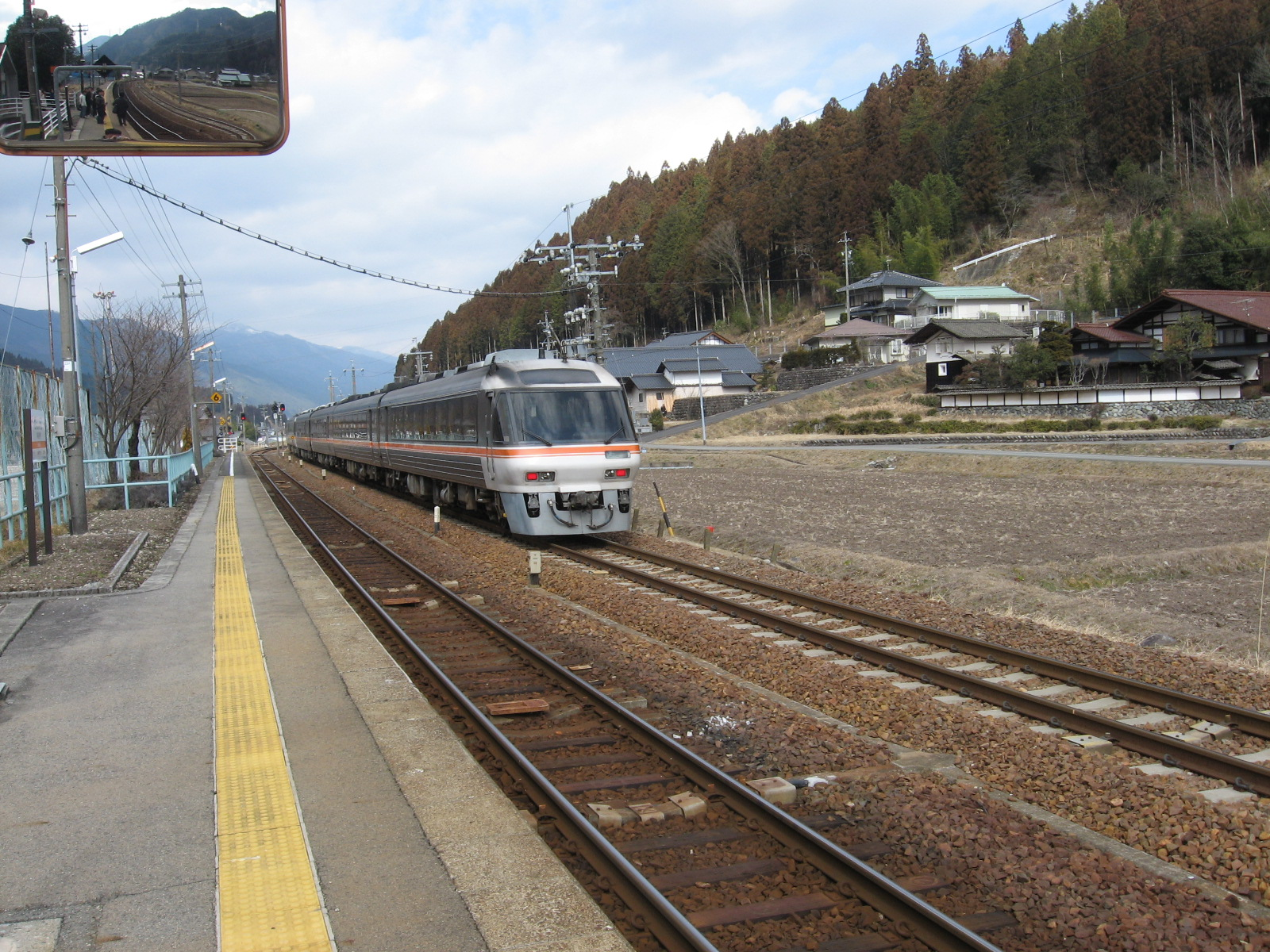 禅昌寺駅ホーム。通過する特急ひだ。